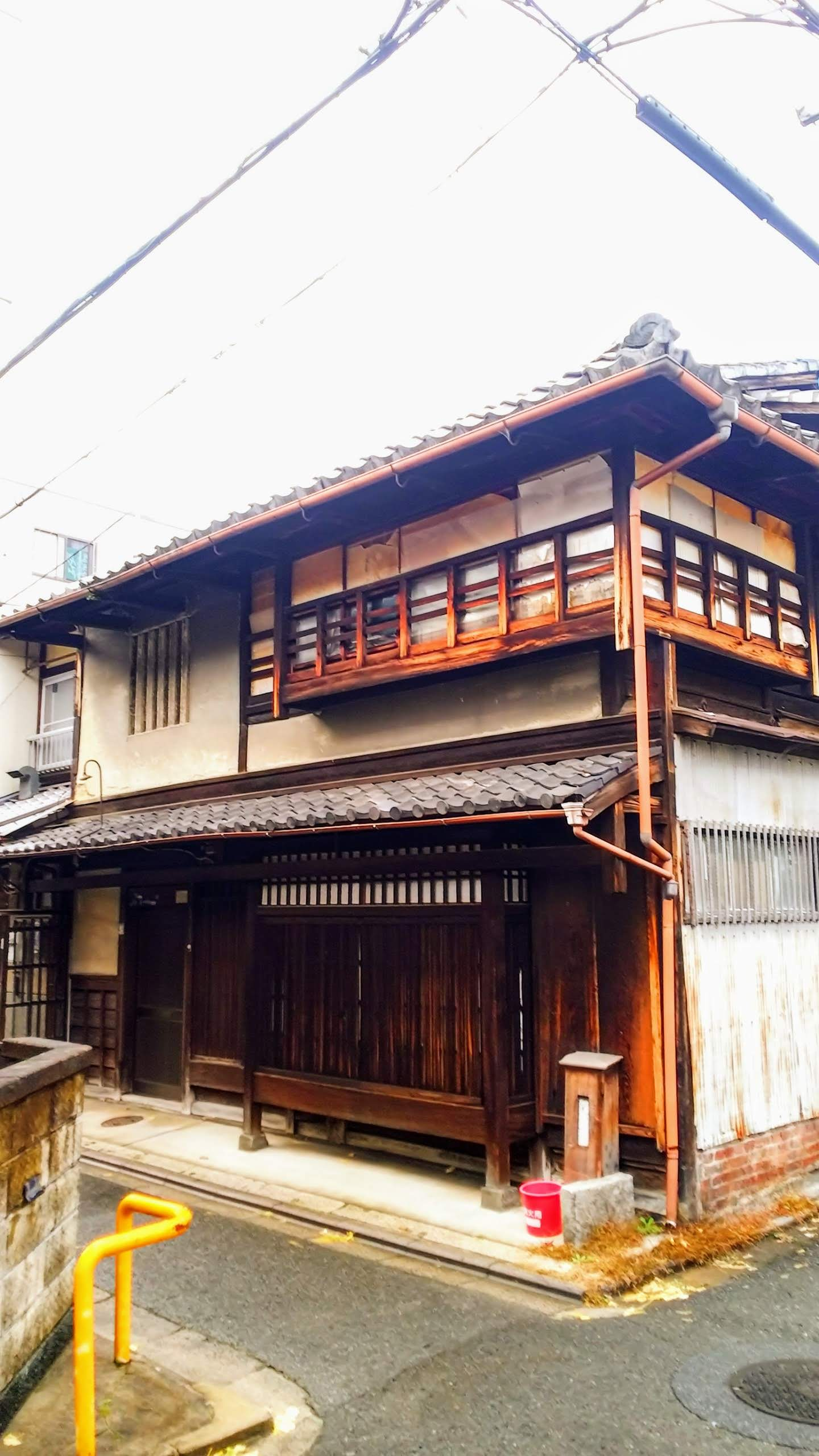 京都市左京区川端二条付近に二条新地という花街が存在した。